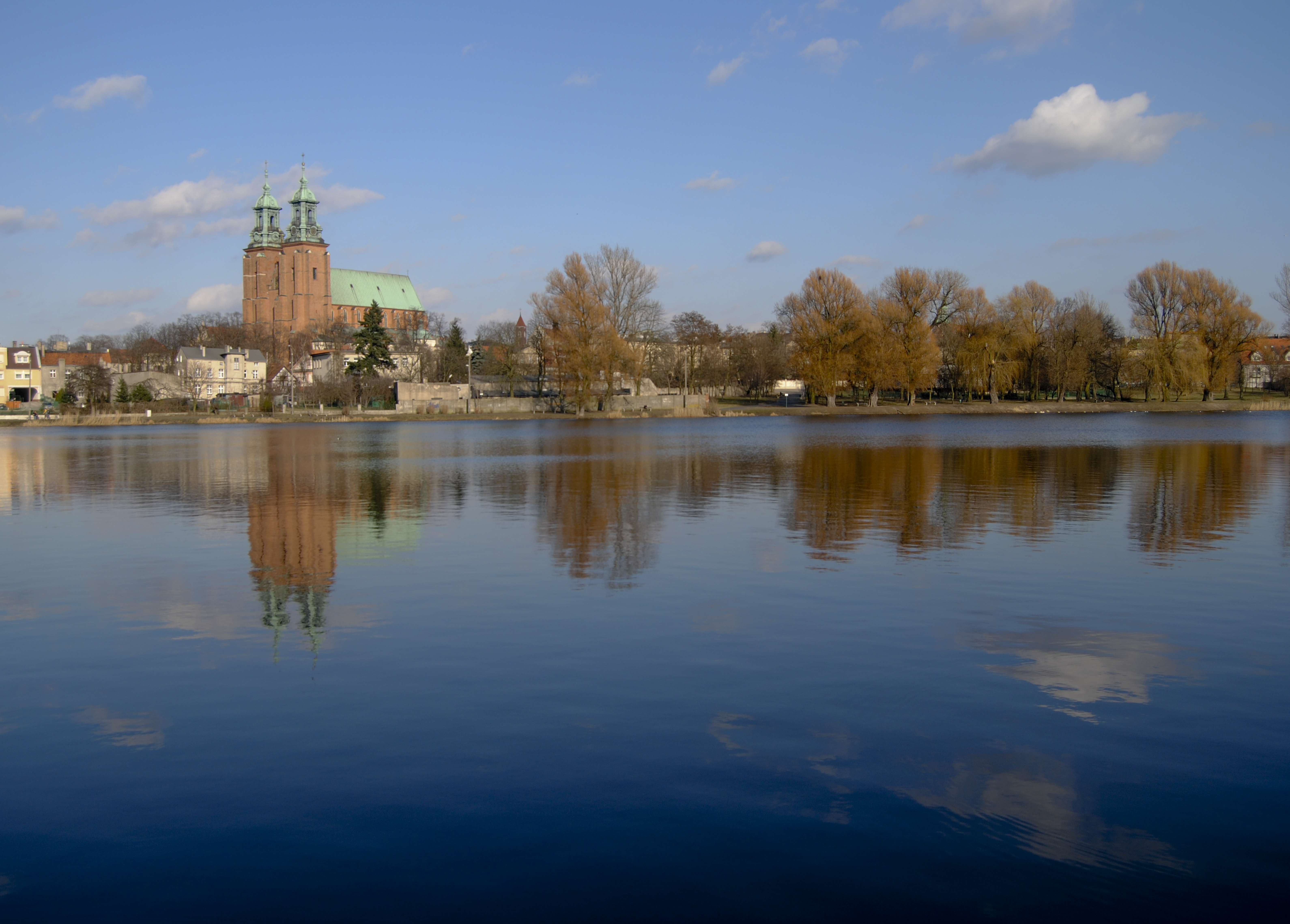 katedra pw. Wniebowzięcia NMP z 2. połowy XIV, XVII, XVIII w. Gniezno, ul. Łaskiego, Gniezno